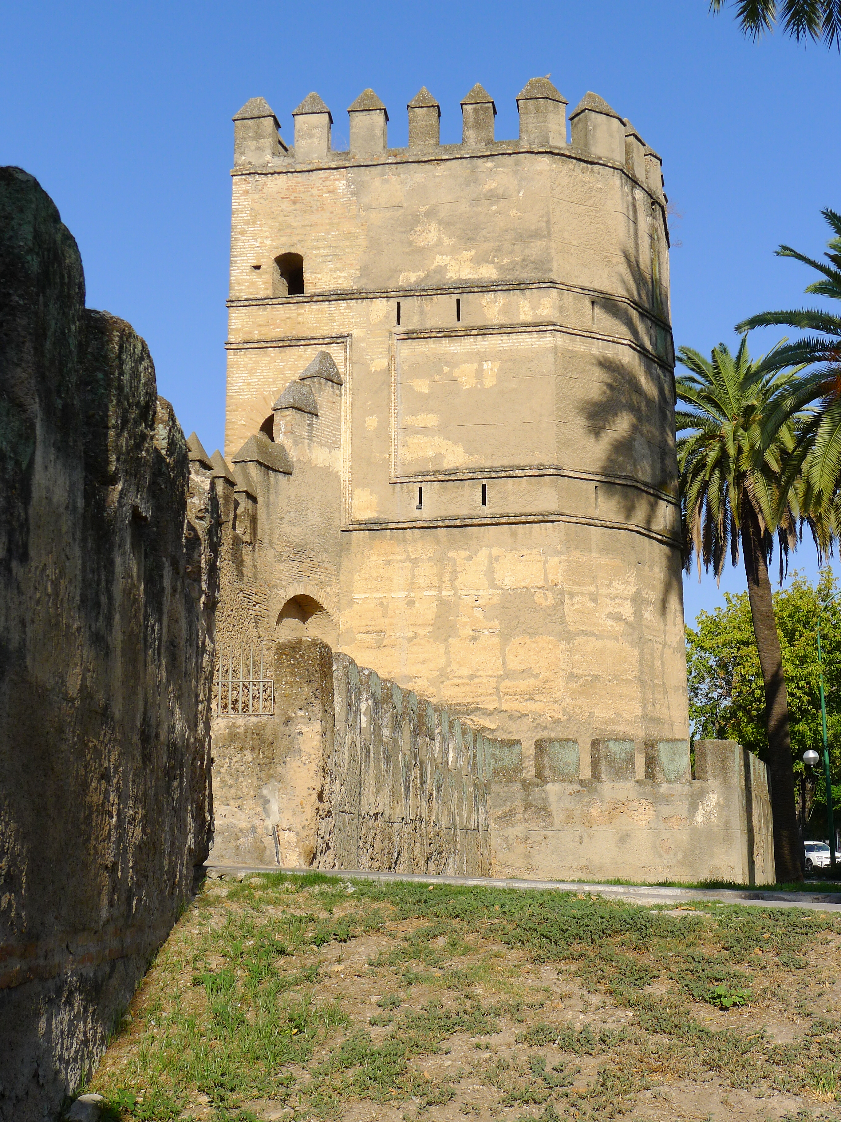 Llamadas "murallas de la Macarena". La datación es incierta. Para algunos es uno de los escasícimos restos almorávides en Sevilla.